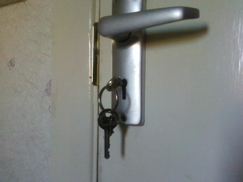 Ключ в замочной скважине.